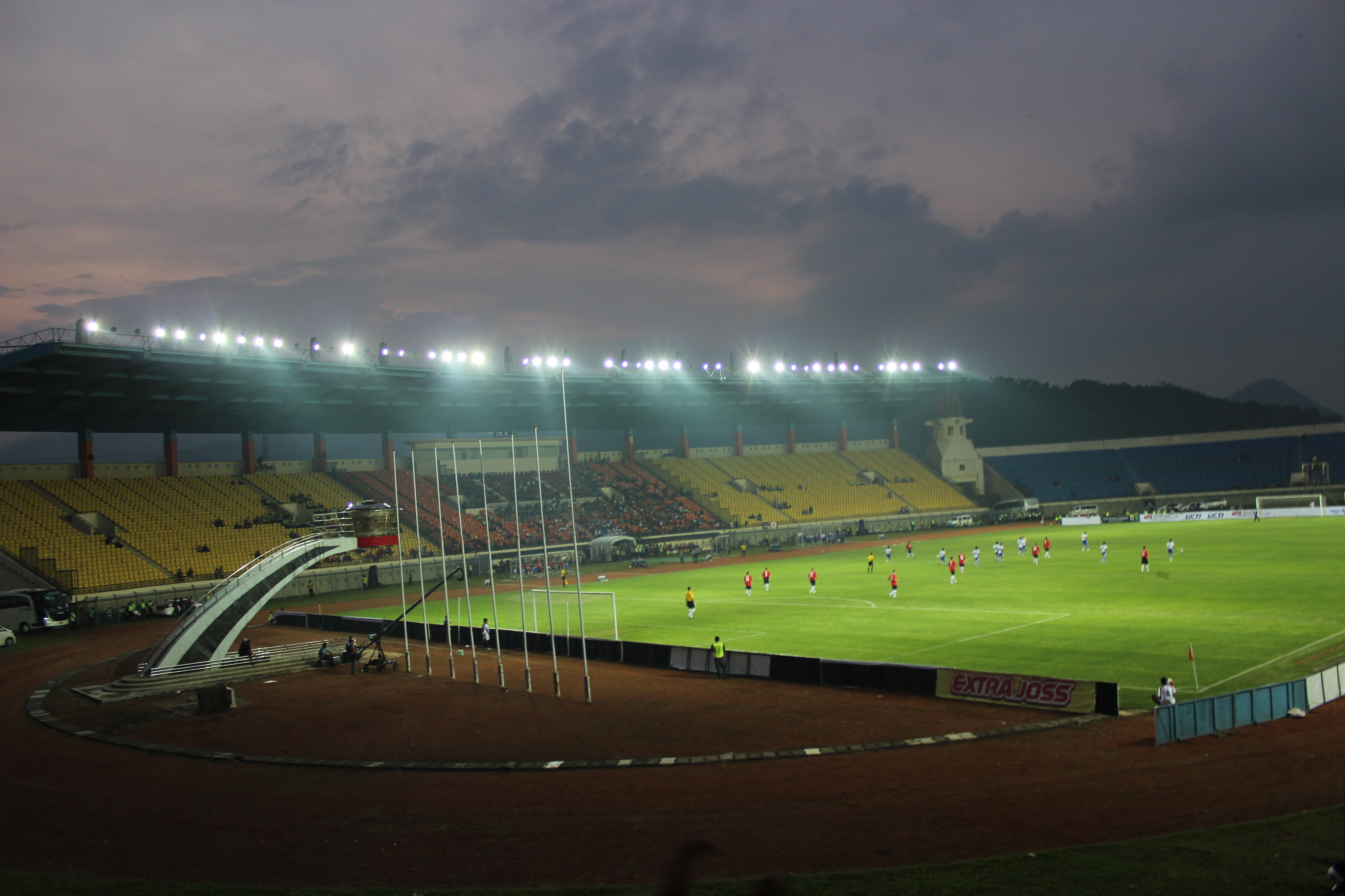 Stadion Si Jalak Harupat